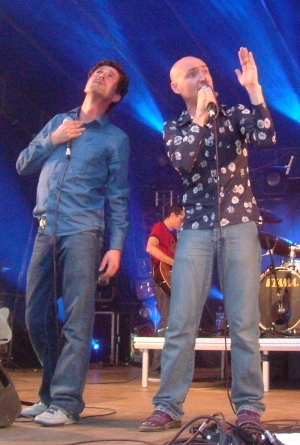 Les Fatals Picards: Paul Léger (left) and Ivan Callot at the fête de la musique in Douai, 2005.